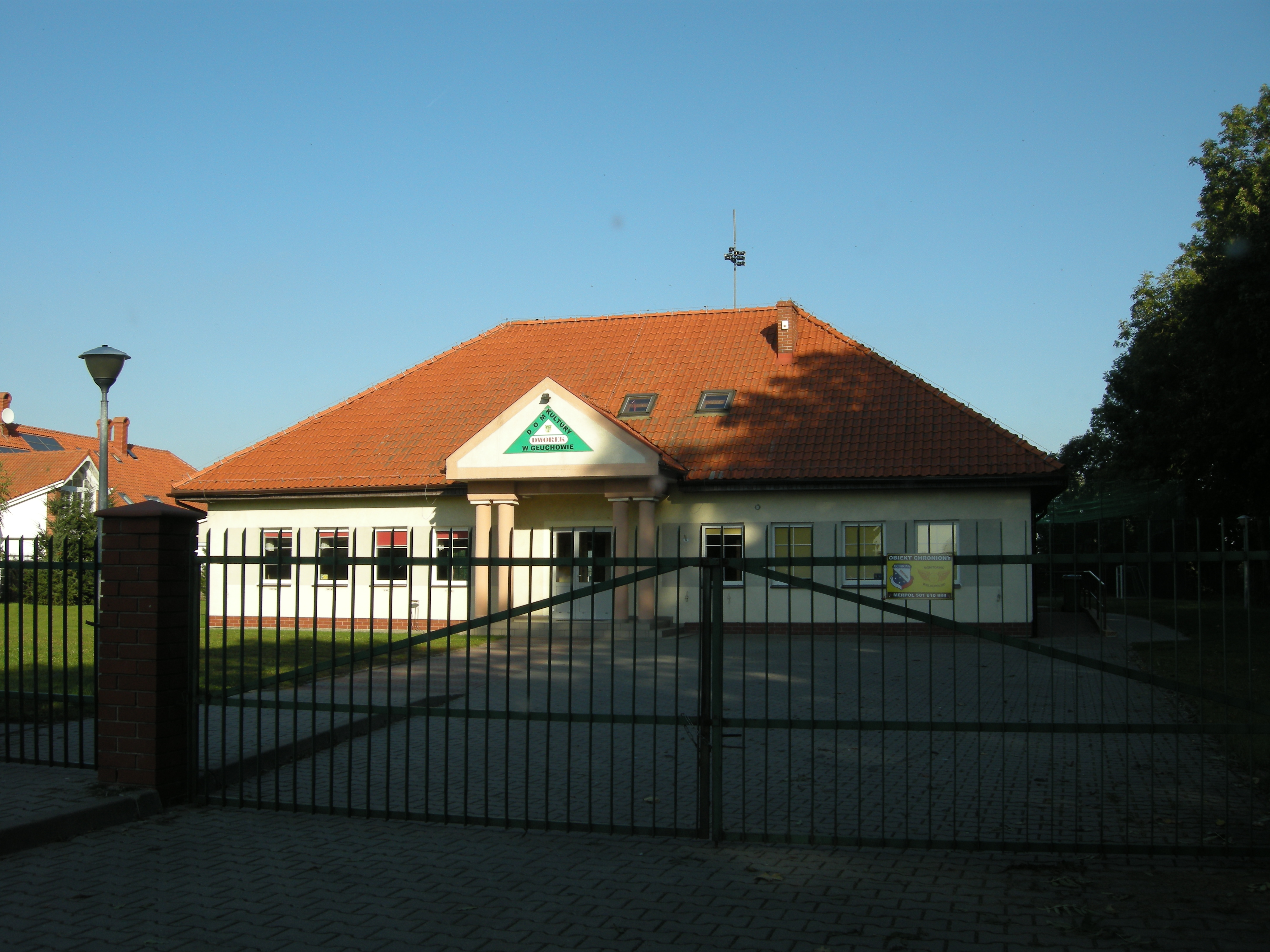 Dom kultury "Dworek" w Gułchowie. Powiat poznański. Gmina Komorniki. Województwo wielkopolskie.